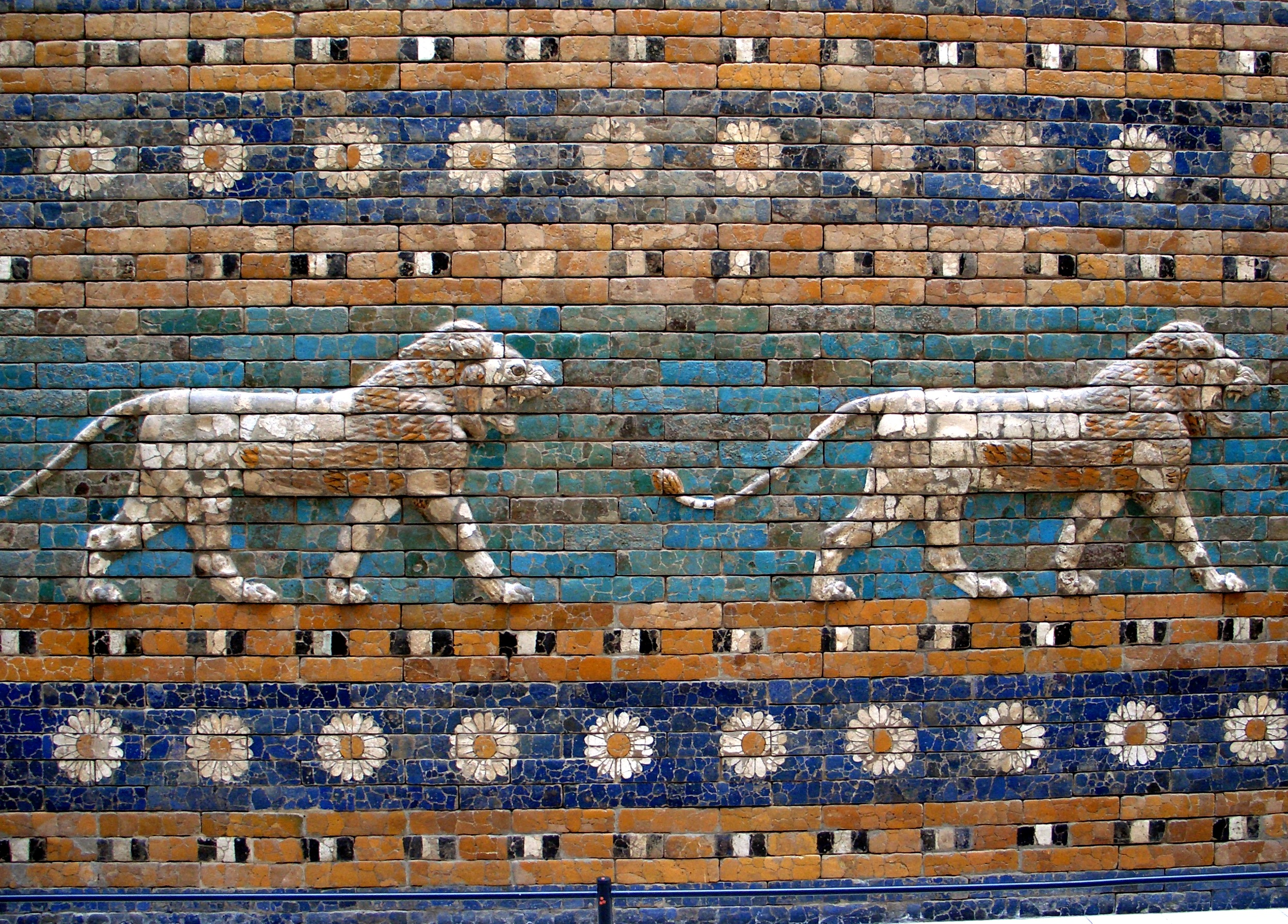 Berlín - Pergamon - Porta d'Ishtar - Lleons